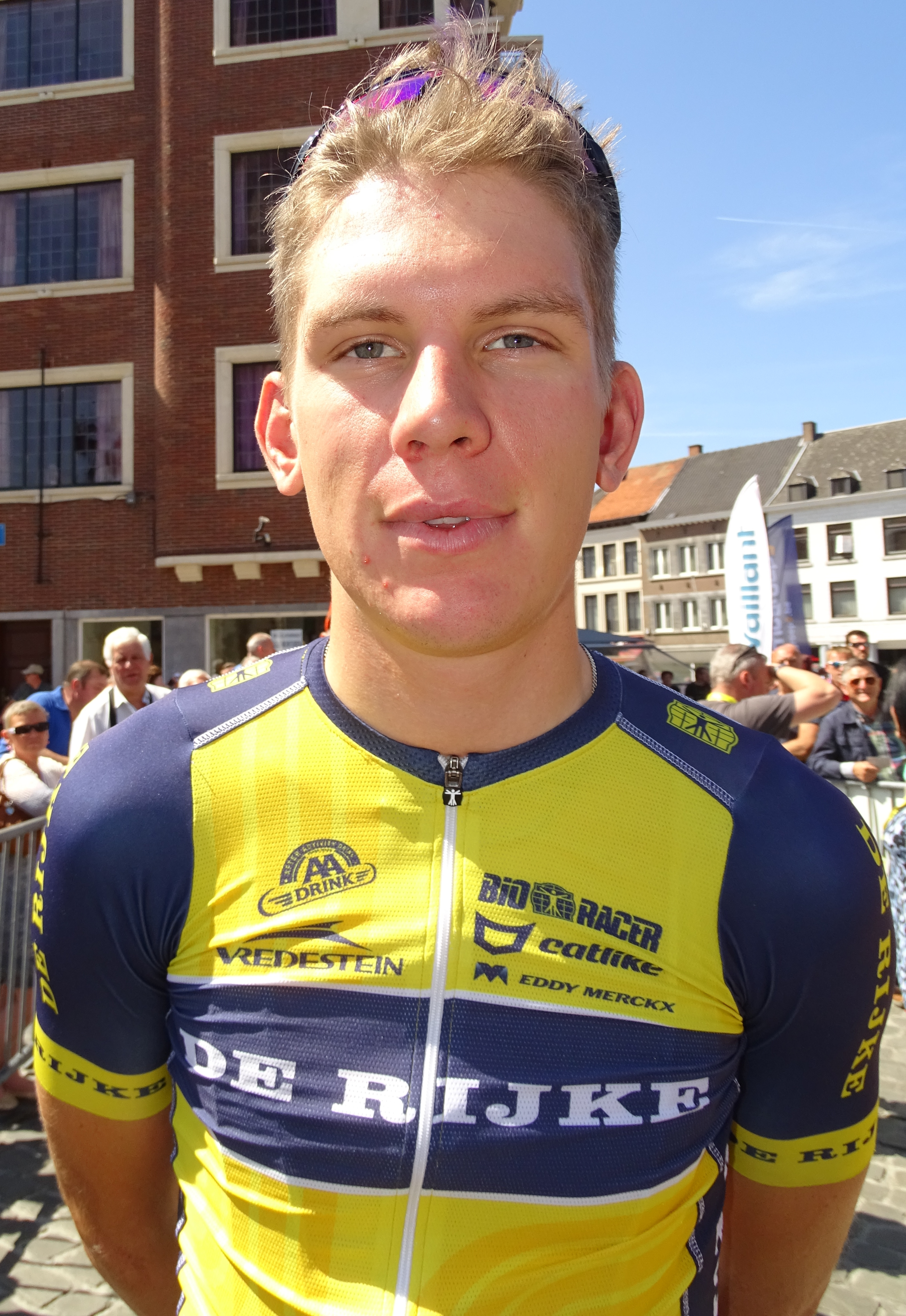 Reportage réalisé le dimanche 14 juin à l'occasion du départ et de l'arrivée du Tour du Limbourg 2015 à Tongres, Belgique.